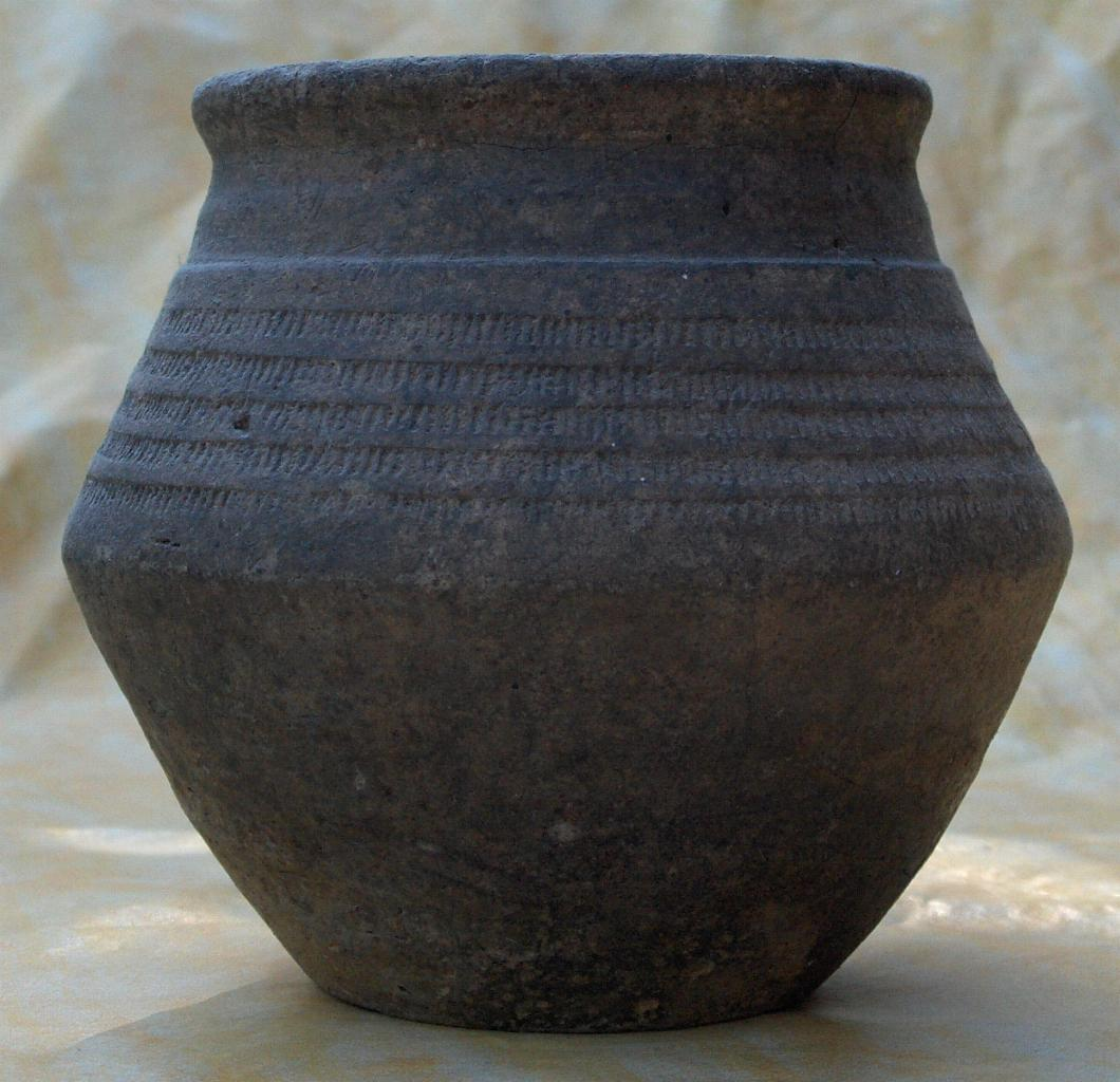 Topf aus Rill